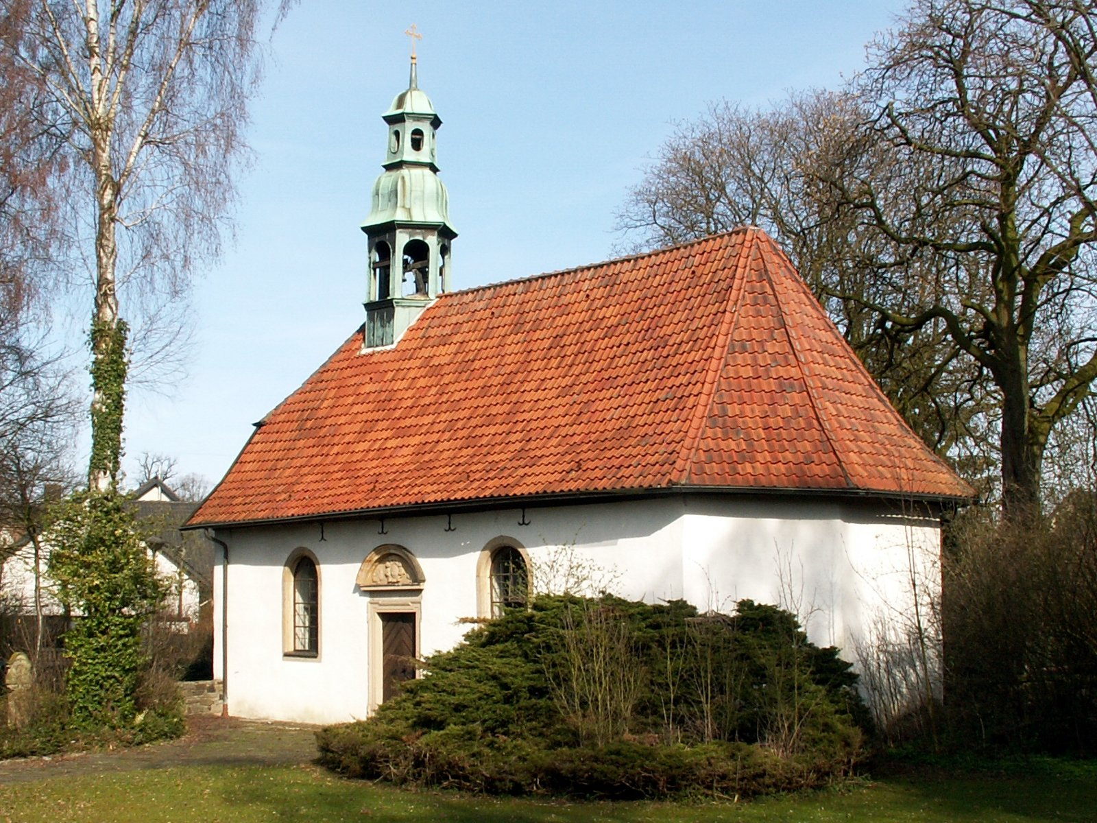 kath. Burgkapelle Maria Trost in Osnabrück, Stadtteil Eversburg, Ansicht von Südwesten